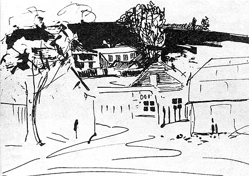 Вуліца ў Мозыры